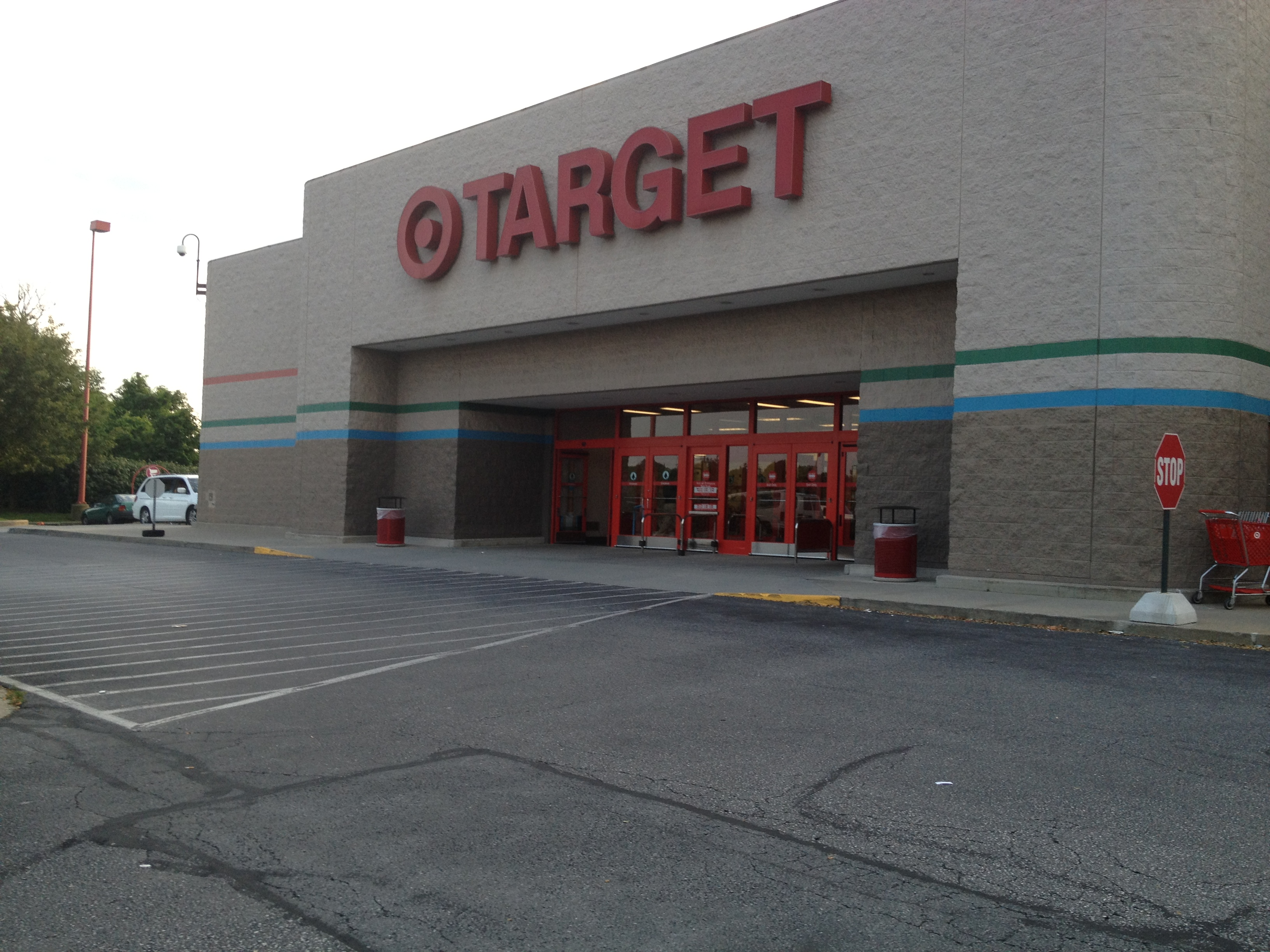 Target Westminster, MD